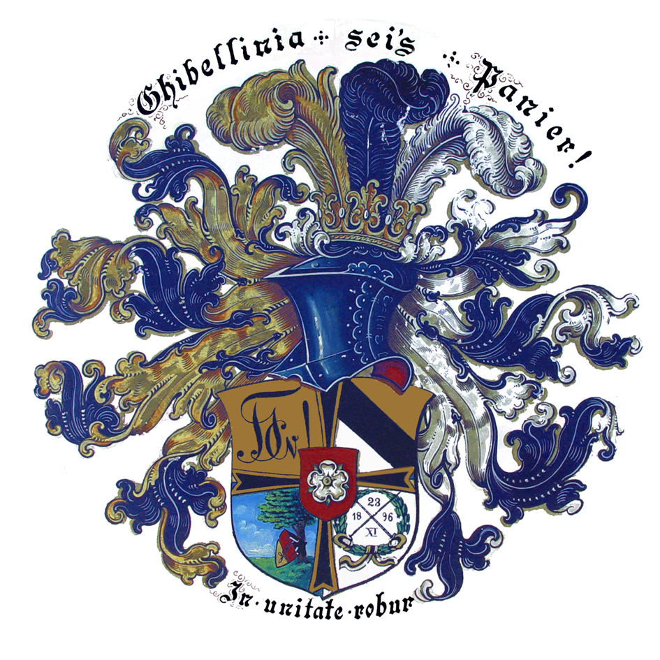 Haus der KB! Ghibellinia